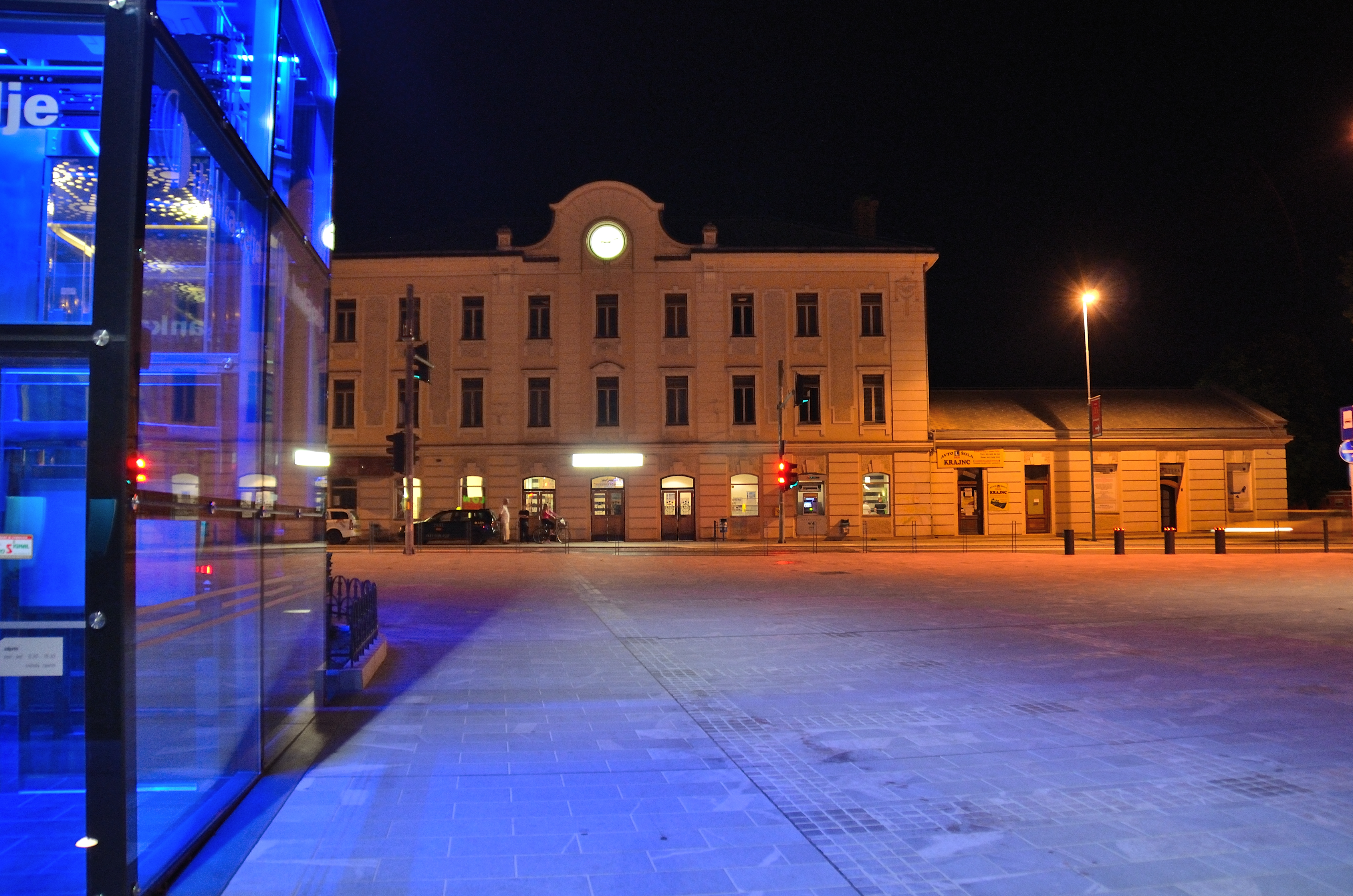 CELJE ŽELEZNIŠKA POSTAJA